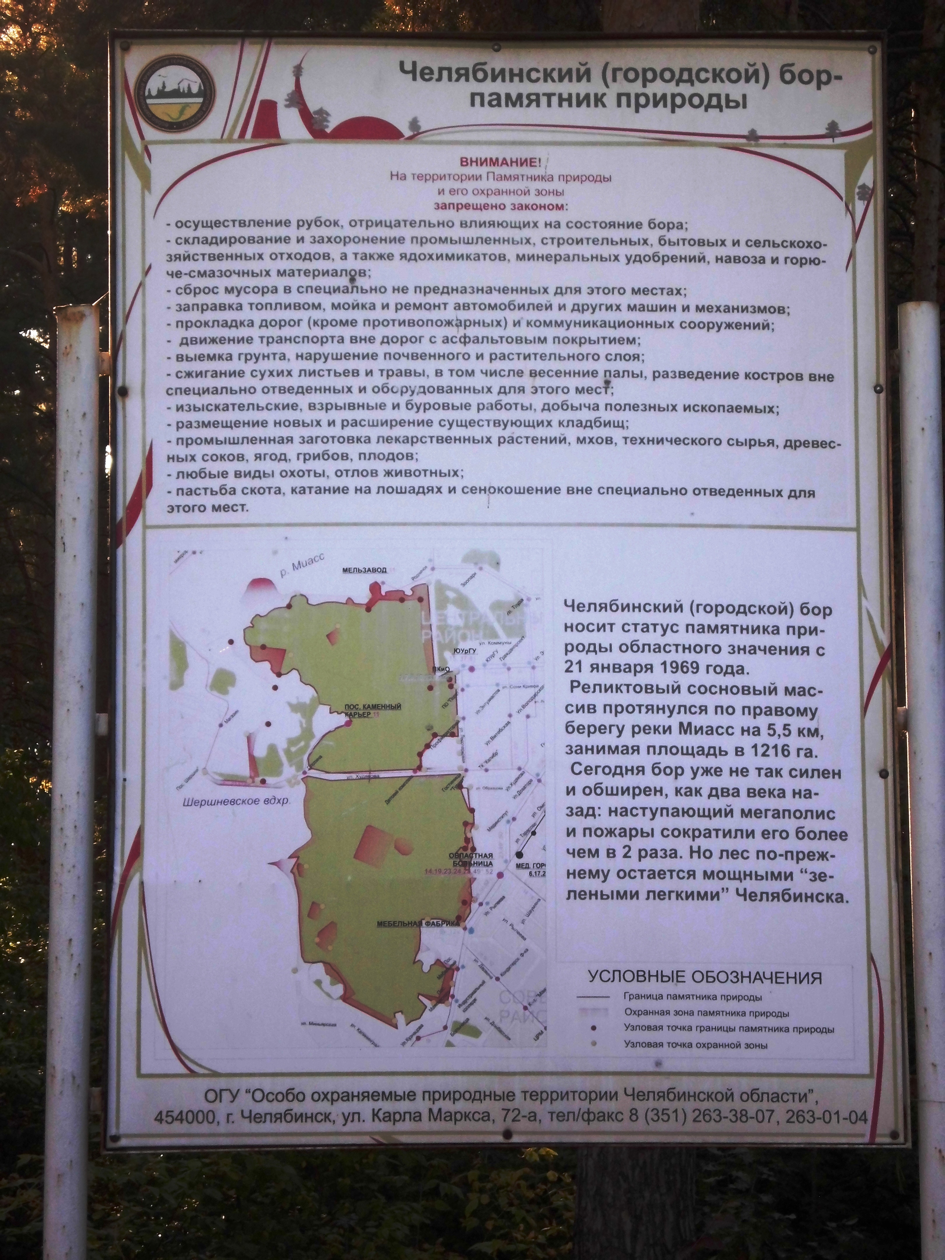 Челябинский городской бор, таблички у пожарного въезда в конце улицы Варненской (у областной больницы). Город Челябинск.